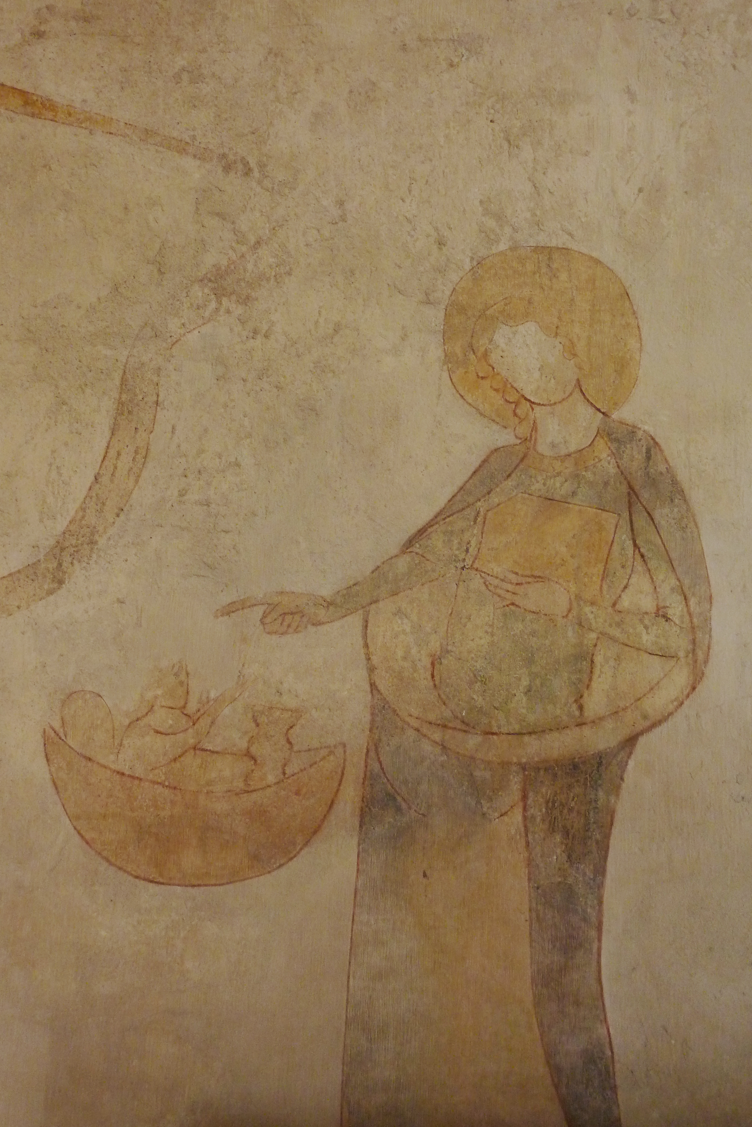 Gotische Wandmalerei in der Peterskapelle in Spay, Darstellung: Erzengel Michael (Szene der Seelenwägung)